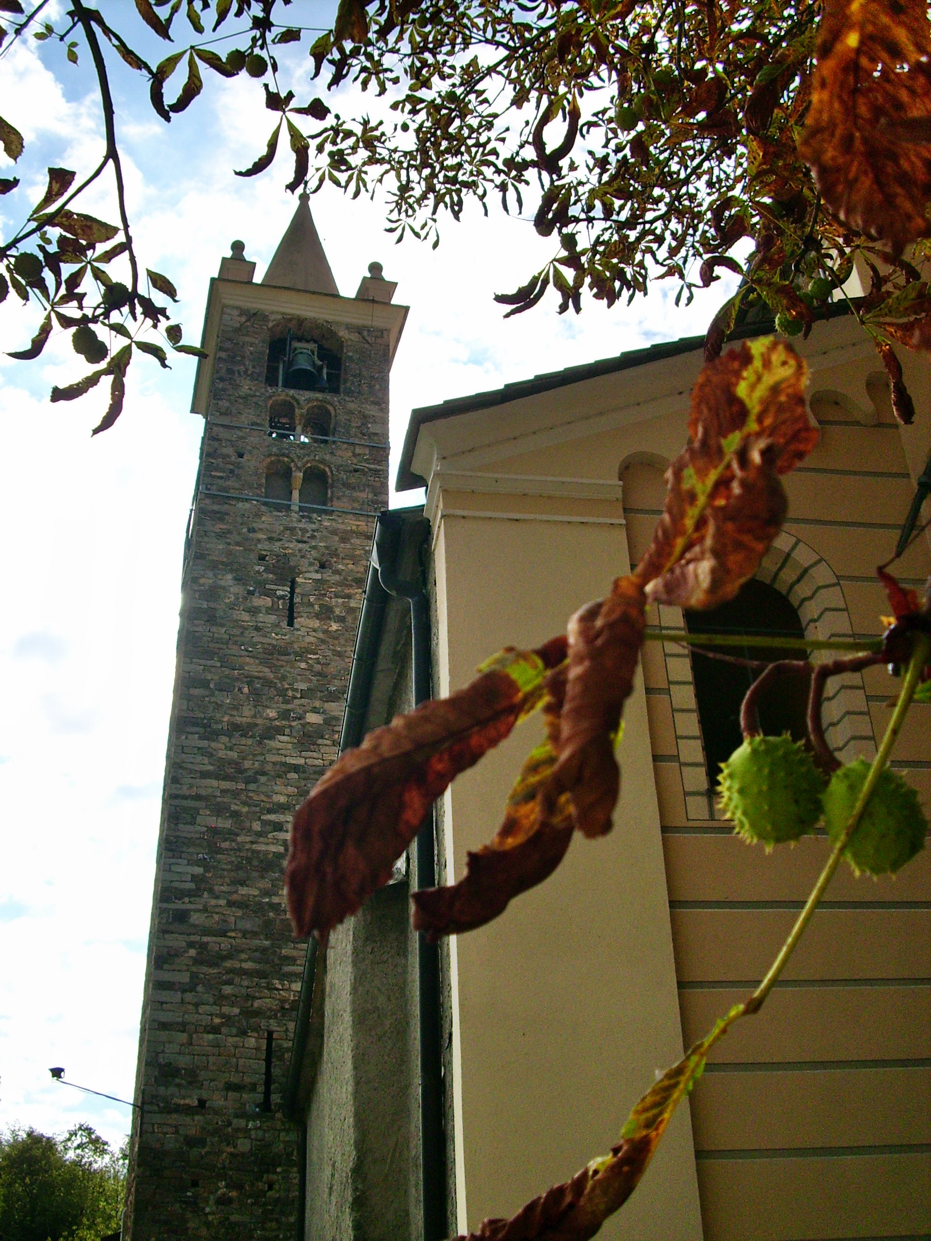 Campanile della chiesa di san Dalmazio di Pornassio, Liguria, Italia